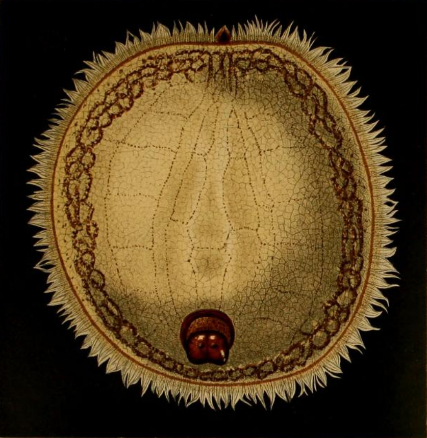 Larve von Microdon rhenanus n. sp., von oben gesehen. Vegr. 12fach (gültiges Synonym = Microdon mutabilis)